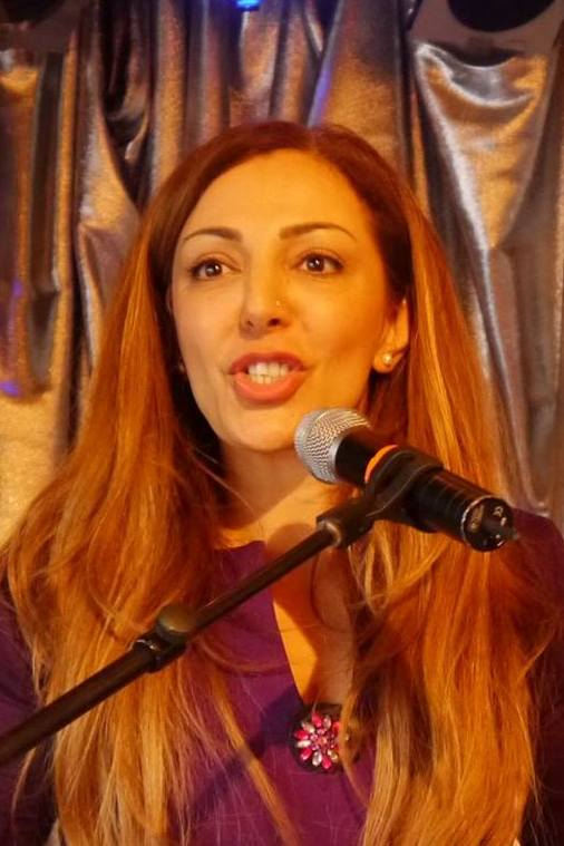 Evrim Sommer spricht auf der Veranstaltung FrauenMacht 2016